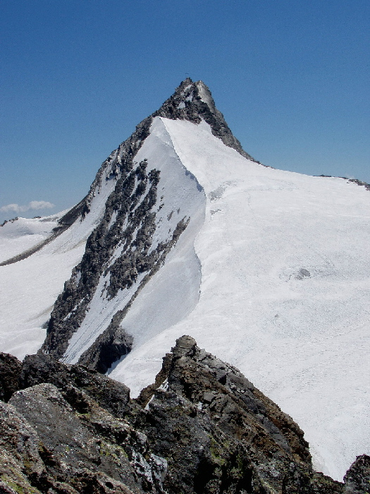 Hochwilde Autor: Peter Schüle Eigenes Foto aus 2004